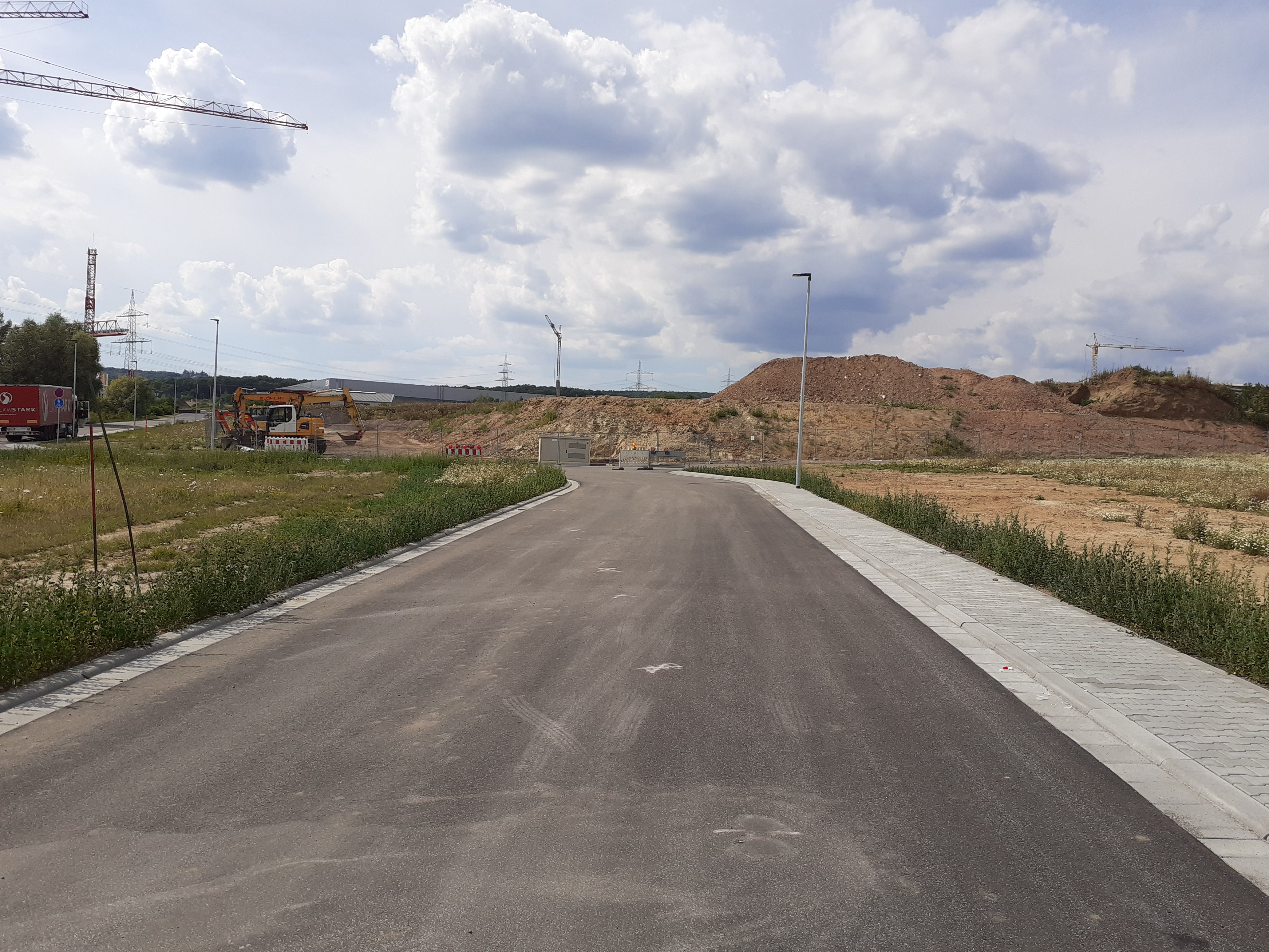 Baustelle der Erweiterung des Gewerbegebiets Waldlaubersheim im Juli 2020